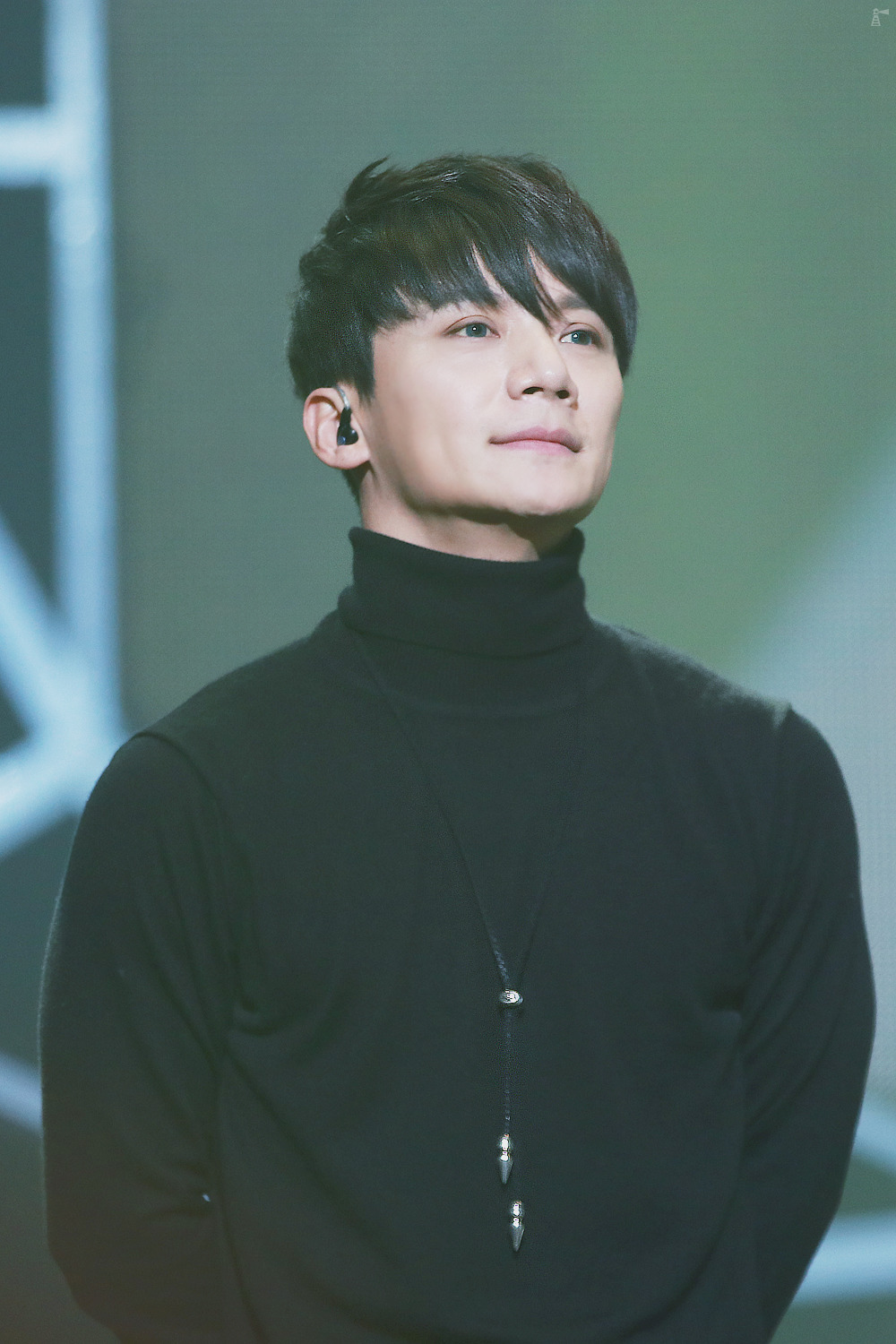 170122 Yellow Note Final 李宰鎮